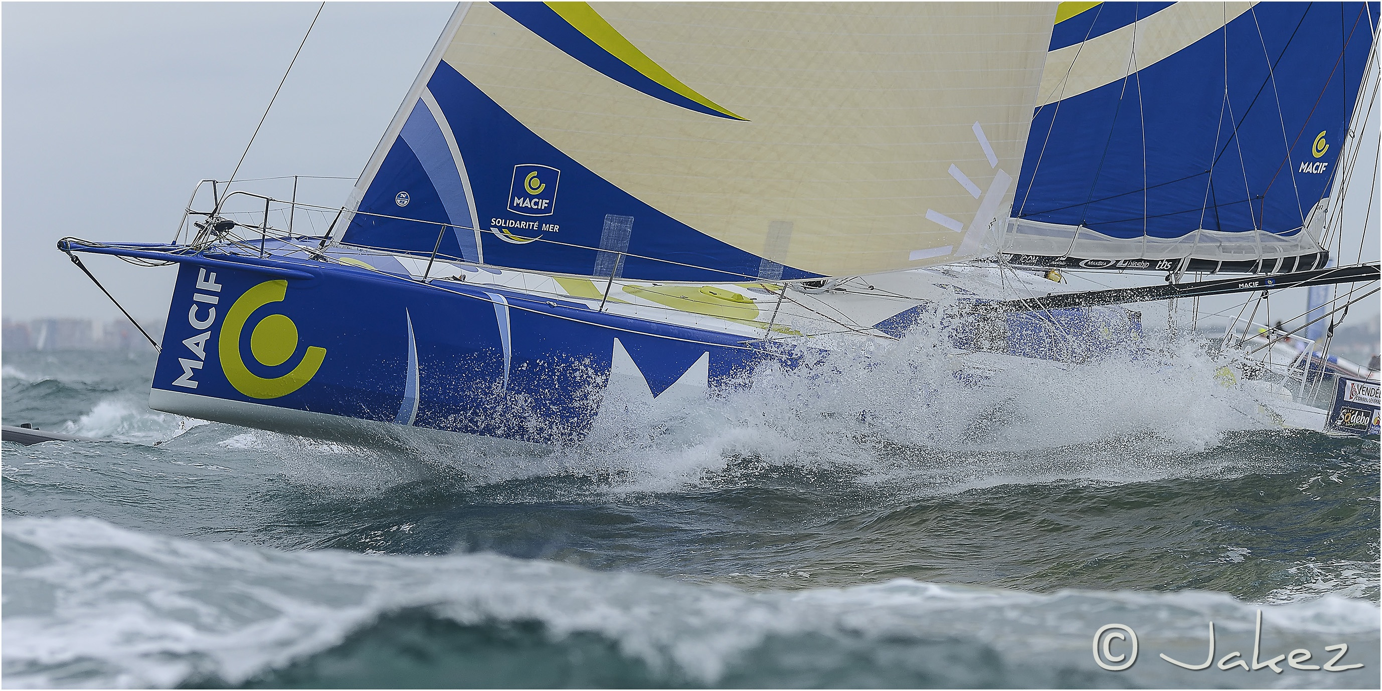 0938-Vendée 2012 (Départ)